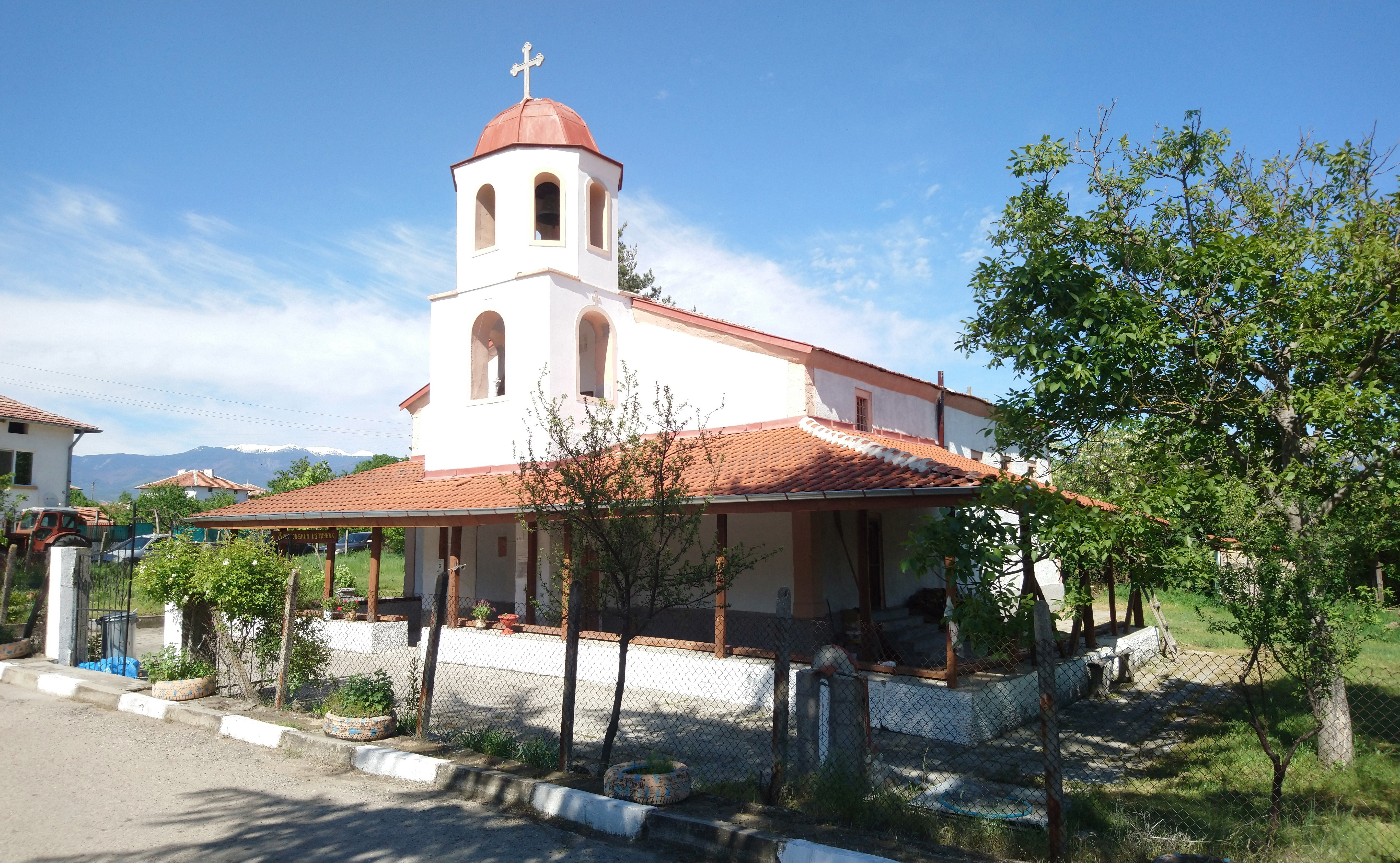 Църквата в село Капатово